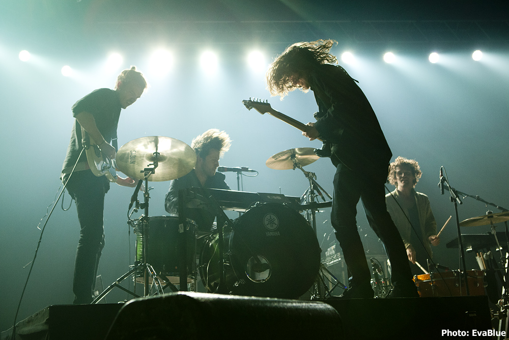 Half Moon Run - C2MTL 2013